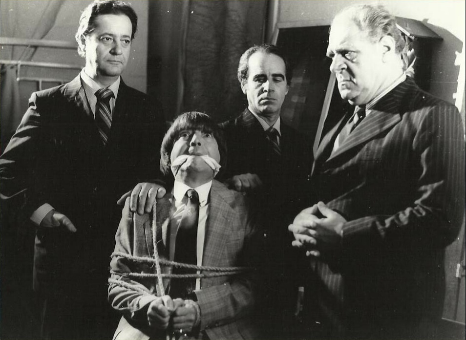 Fotografía de difusión de la película argentina "Cosa de locos"(1981) dirigida por Enrique Dawi. De izquierda a derecha, los actores Vicente La Russa, Carlitos Balá (sentado), Juan Carlos De Seta y Luis Tasca. En el dominio público por caducidad de los derechos de autor en Argentina, Ley 11723, art. 34.